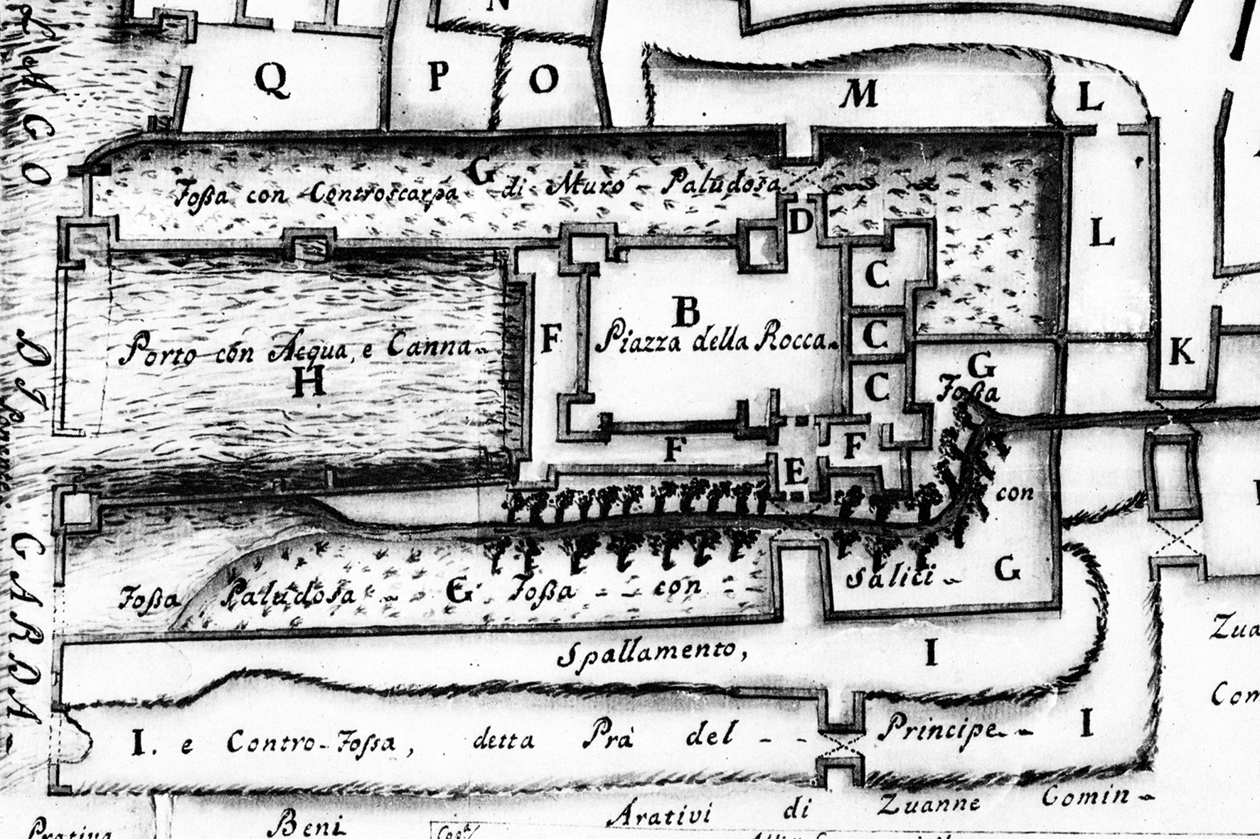 Rilievo dell'ingegnere militare Xaverio, o Saverio, Avesani, realizzato nel 1756